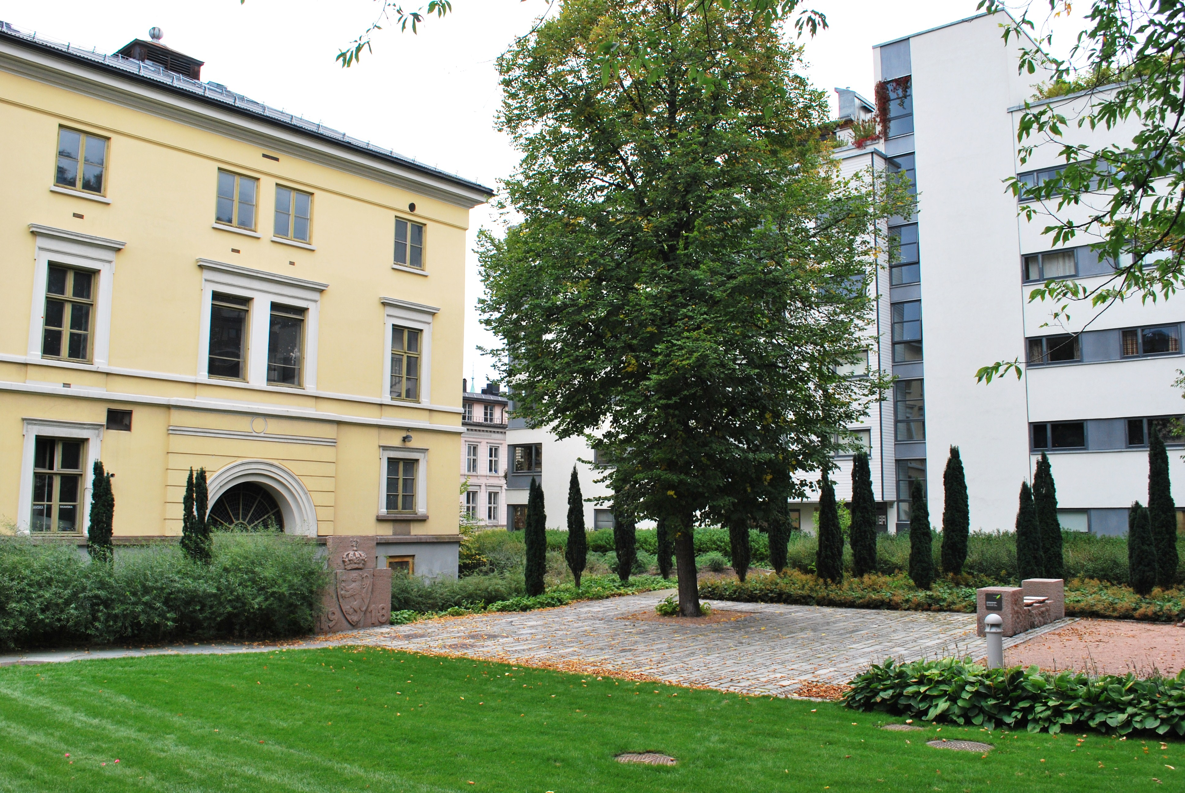 Gjenbruksparken, Pilestredet park, Oslo